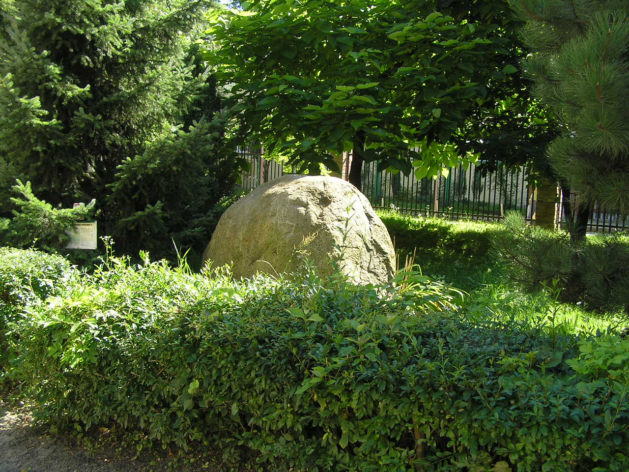 "Rapa Kiwi" - granitowy głaz narzutowy - pomnik przyrody na terenie Krakowa